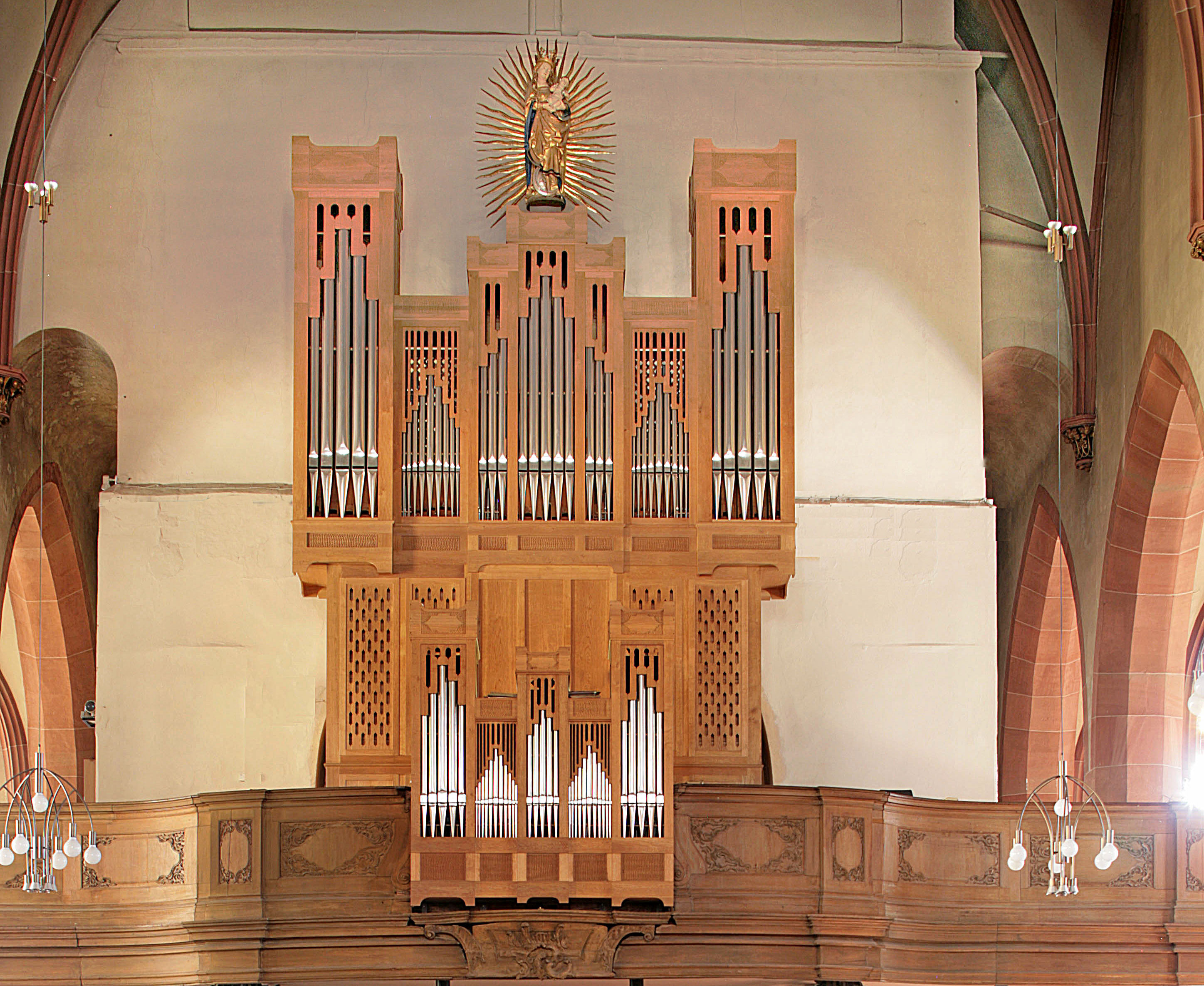 Orgel in der Stiftskirche Baden-Baden, Baden-Württemberg, Deutschland